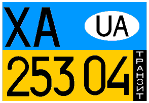 Транзитный номер Украины, 1995-2000 годы